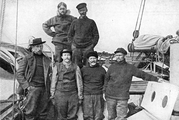 Экипаж яхты Амундсена «Йоа» в порту Ном по окончании преодоления Северо-Западного прохода. В первом ряду слева направо: Амундсен, Педер Ристведт, Адольф Линдстрём, Хельмер Хансен. В верхнем ряду Годфрид Хансен и Антон Лунд.